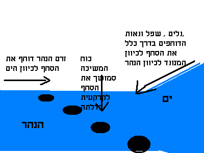 תיאור סכמטי של הכוחות הפועלים על הסחף בדלתה (נוצר על ידי)